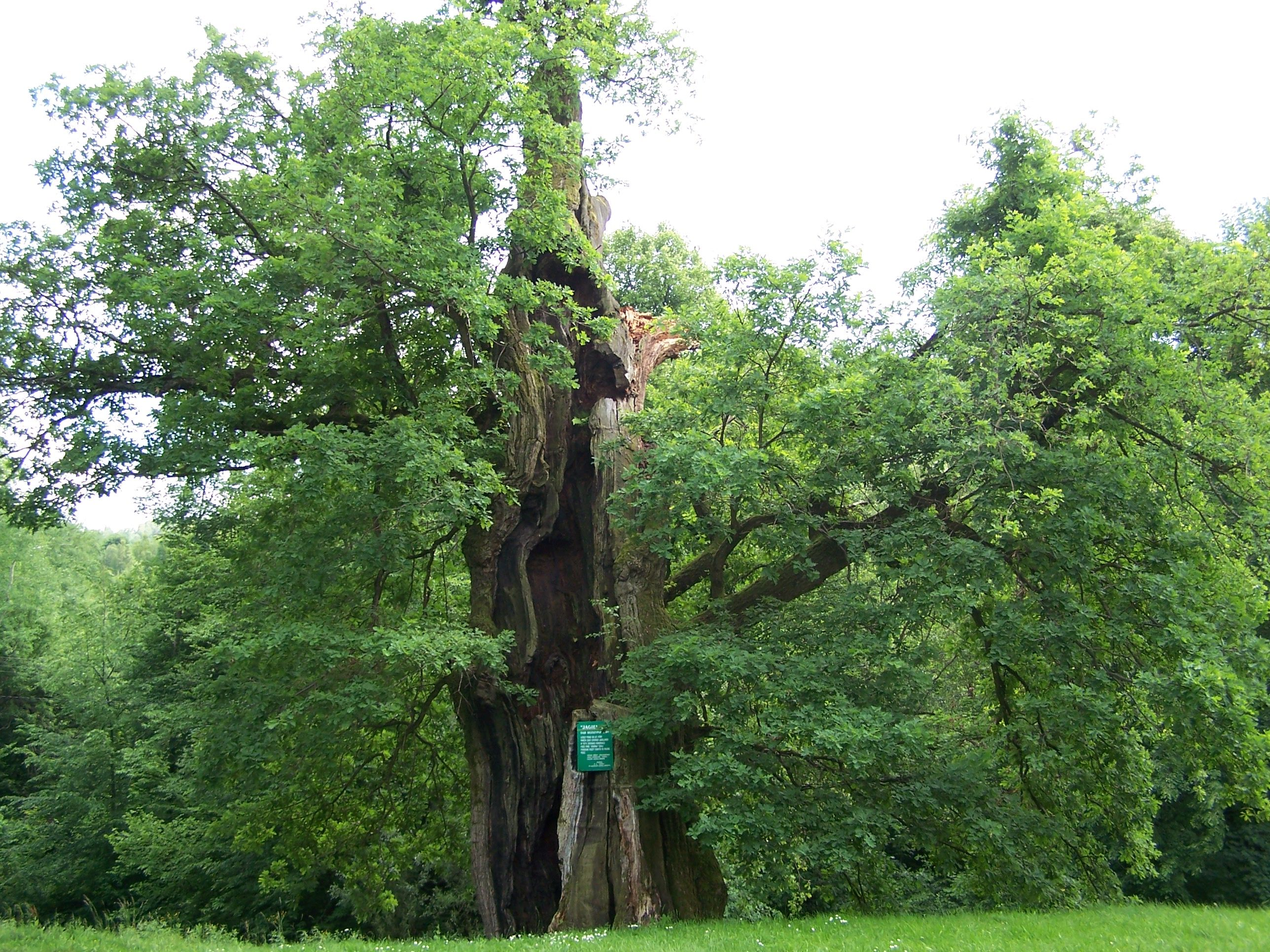 Dąb Jagiellon w Rzepniku - podkarpackie